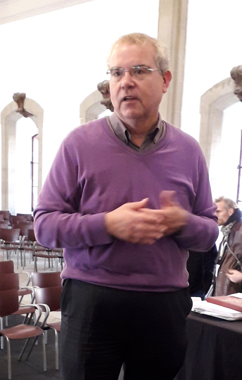 Ramon Augé Gené, alcalde de Cervera, durant la Viquitrobada 2019.